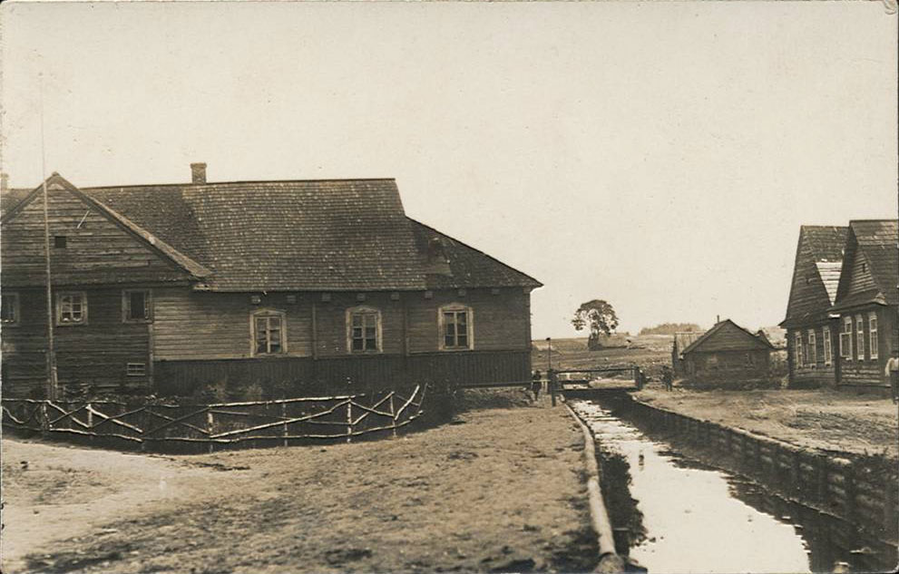 Беларуская (тарашкевіца): Гальшаны (Halšany). Сынагога